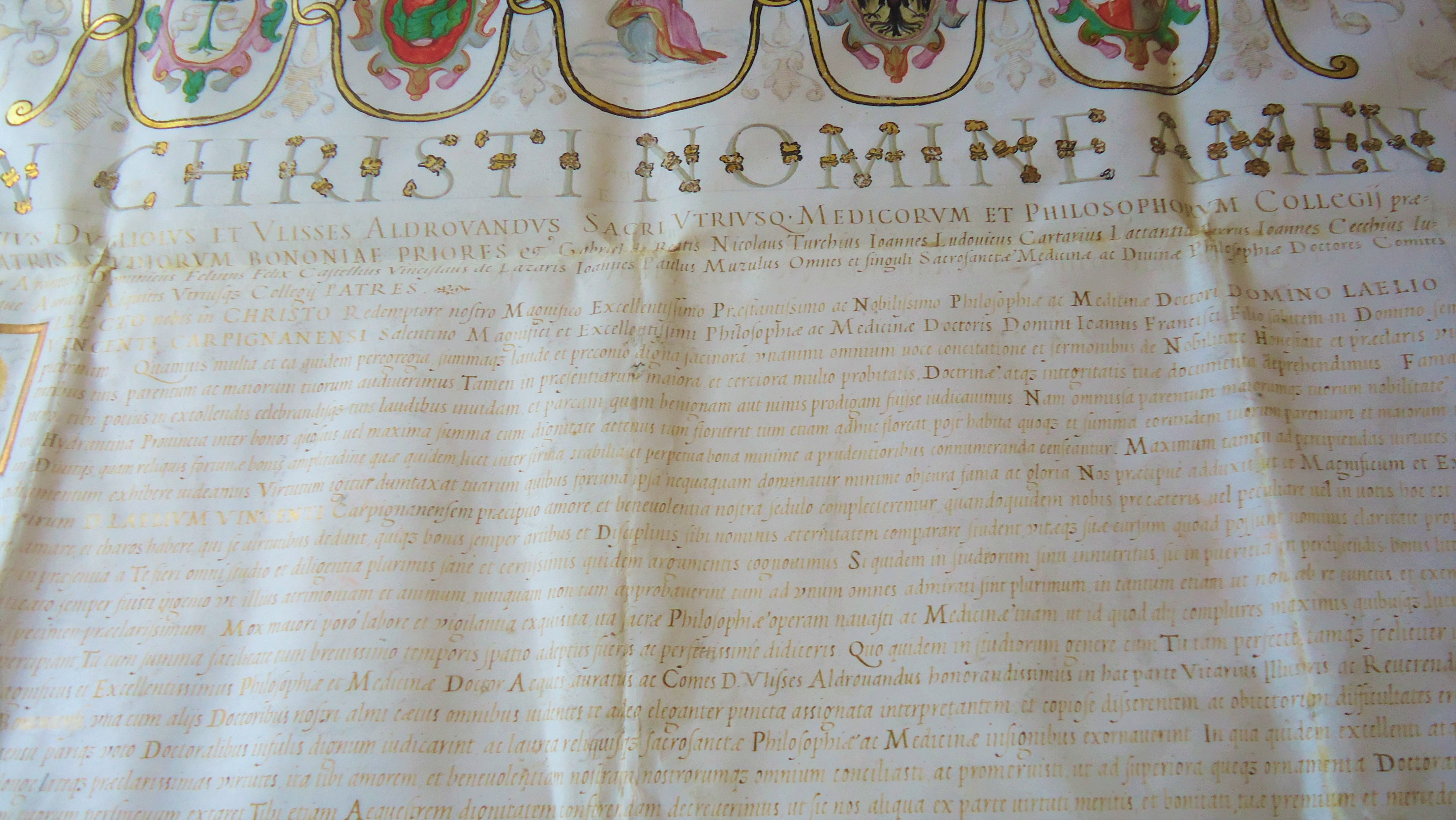 Diploma di laurea in medicina e filosofia, su pergamena, con miniature, bollo ceralacca e scritte in oro, rilasciato dall'Università di Bologna a Lelio Vincenti nel 1587. Incipit col nome di Ulisse Adrovandi.